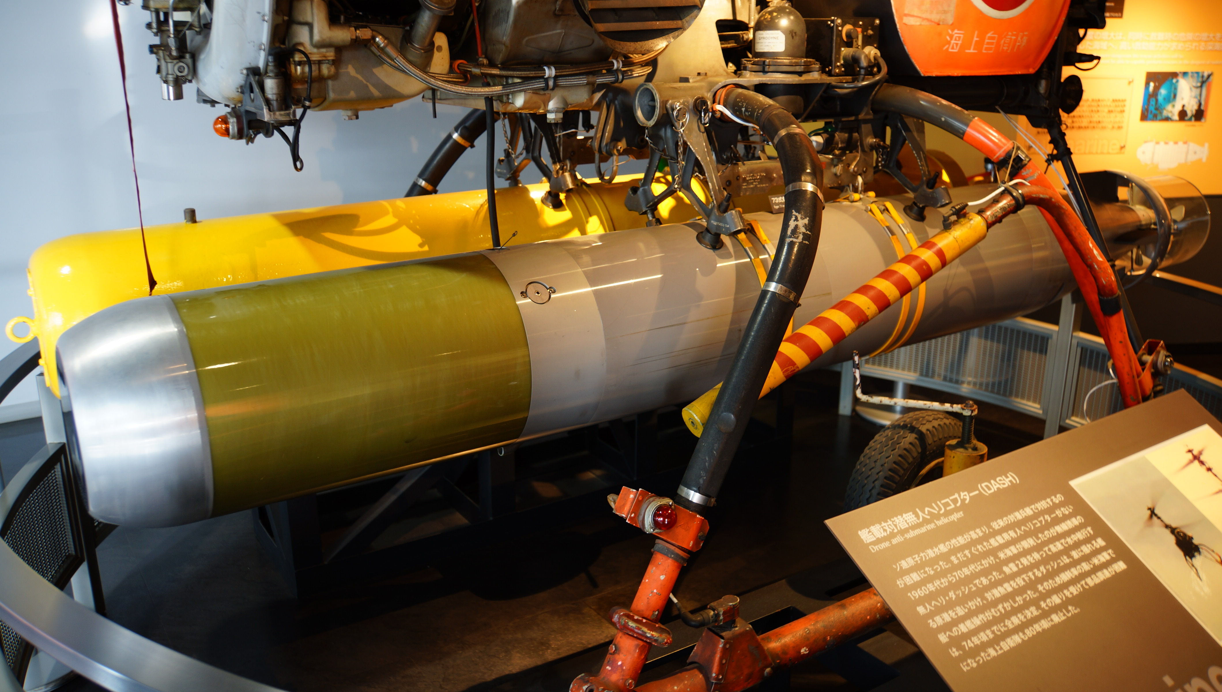 海上自衛隊 73式短魚雷。 14年9月15日 海上自衛隊呉史料館内にて。